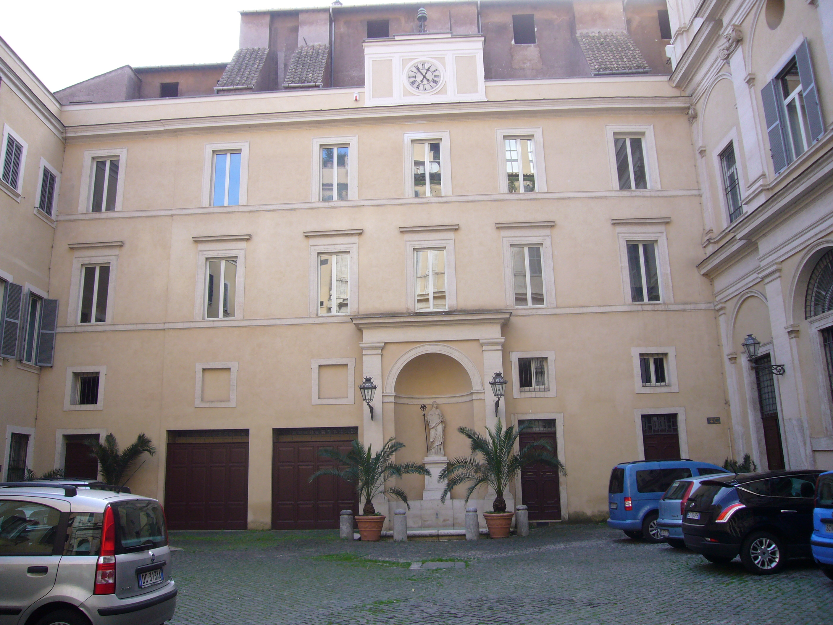 Roma, palazzo Maffei Marescotti oggi del Vicariato, cortile della fontana